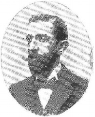 Rafael de la Viesca nuevo subsecretario del Ministerio de Hacienda, obra del fotógrafo Christian Franzen, recogido en la revista española Por Esos Mundos.